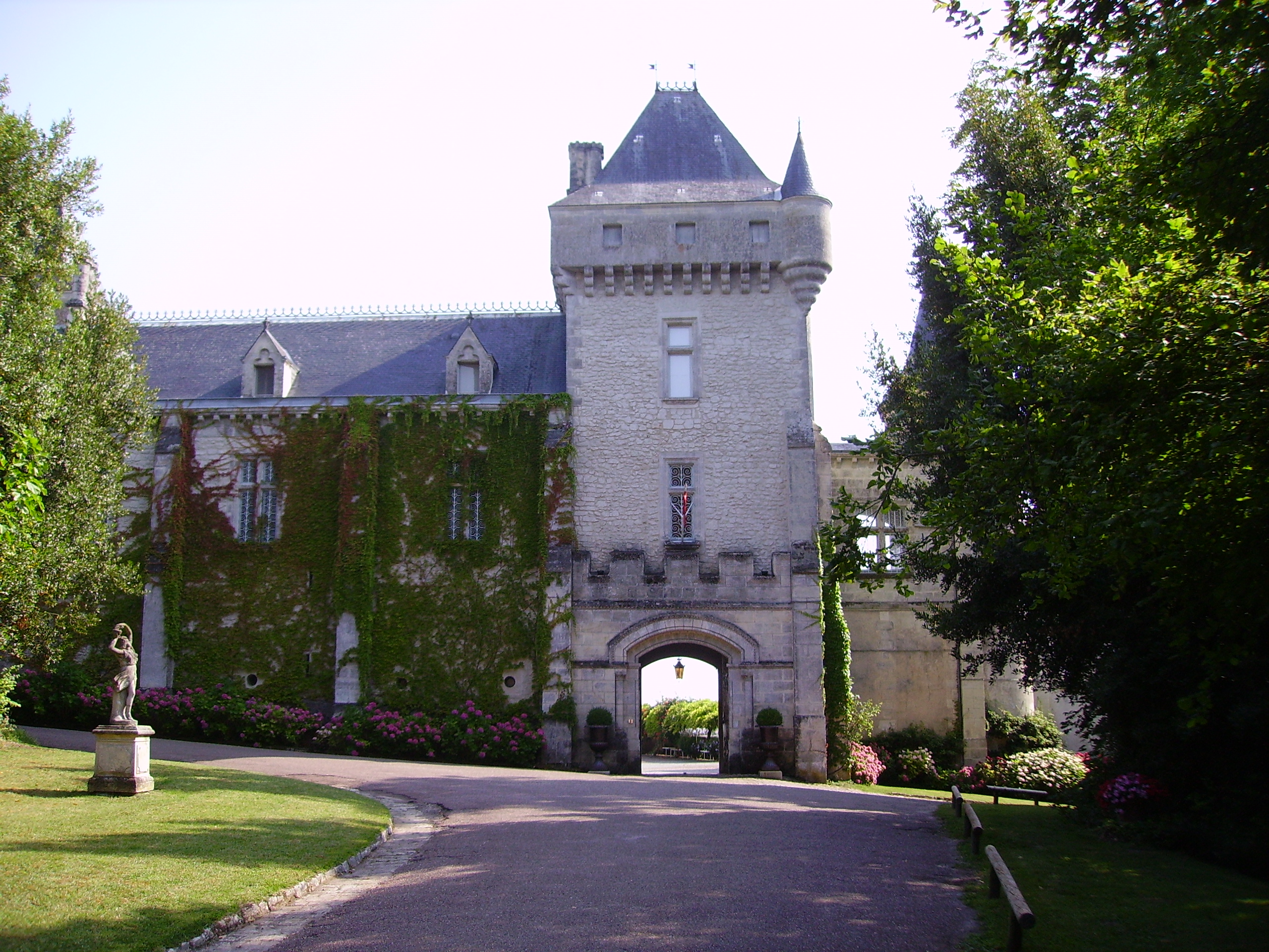 Chateau La Riviere